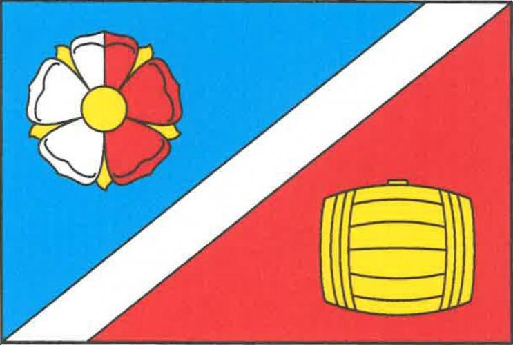 Bečváry vlajka